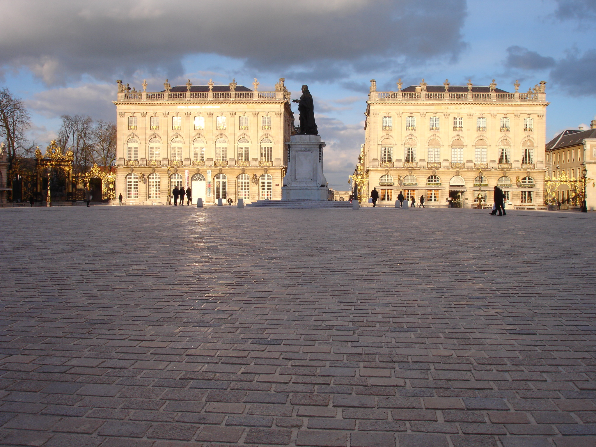 Place Stanislas à Nancy